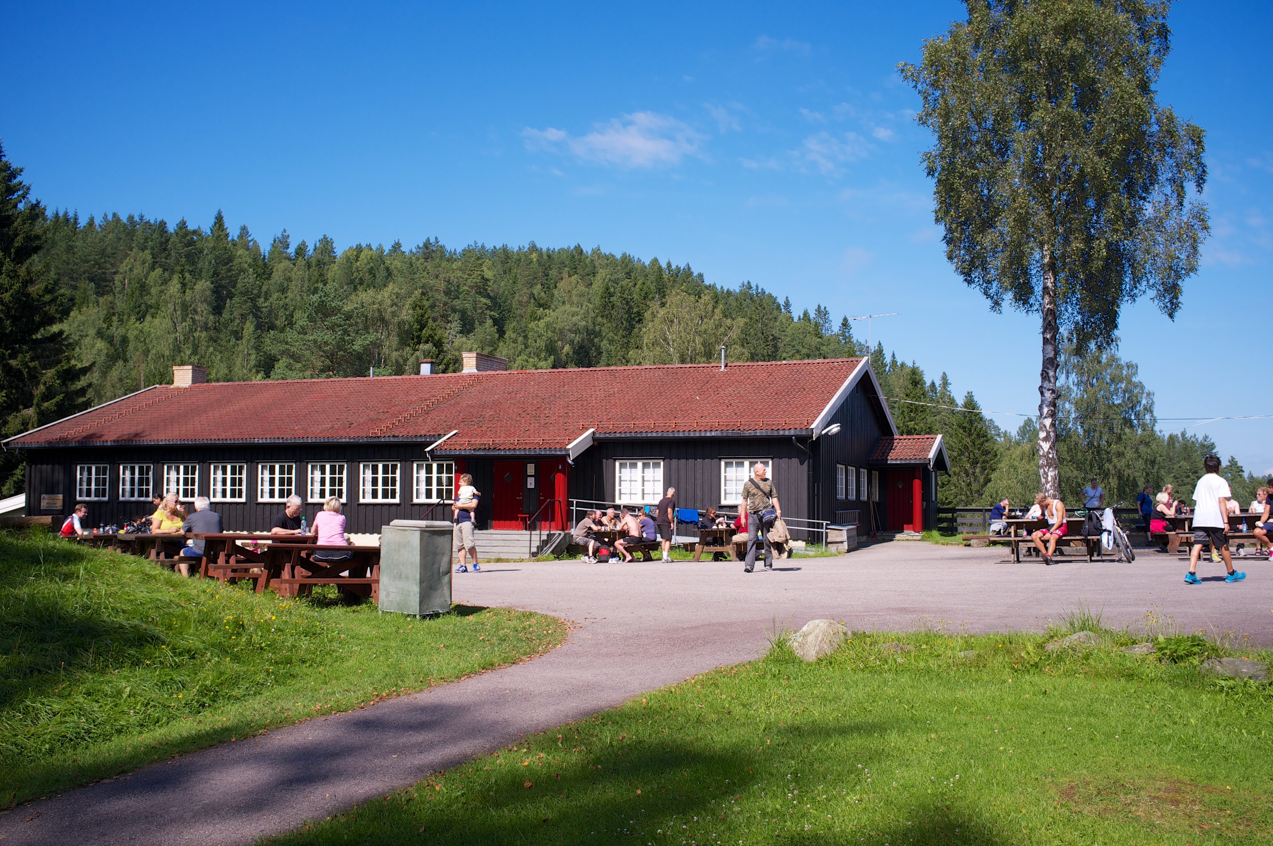 Mariholtet i Østmarka.